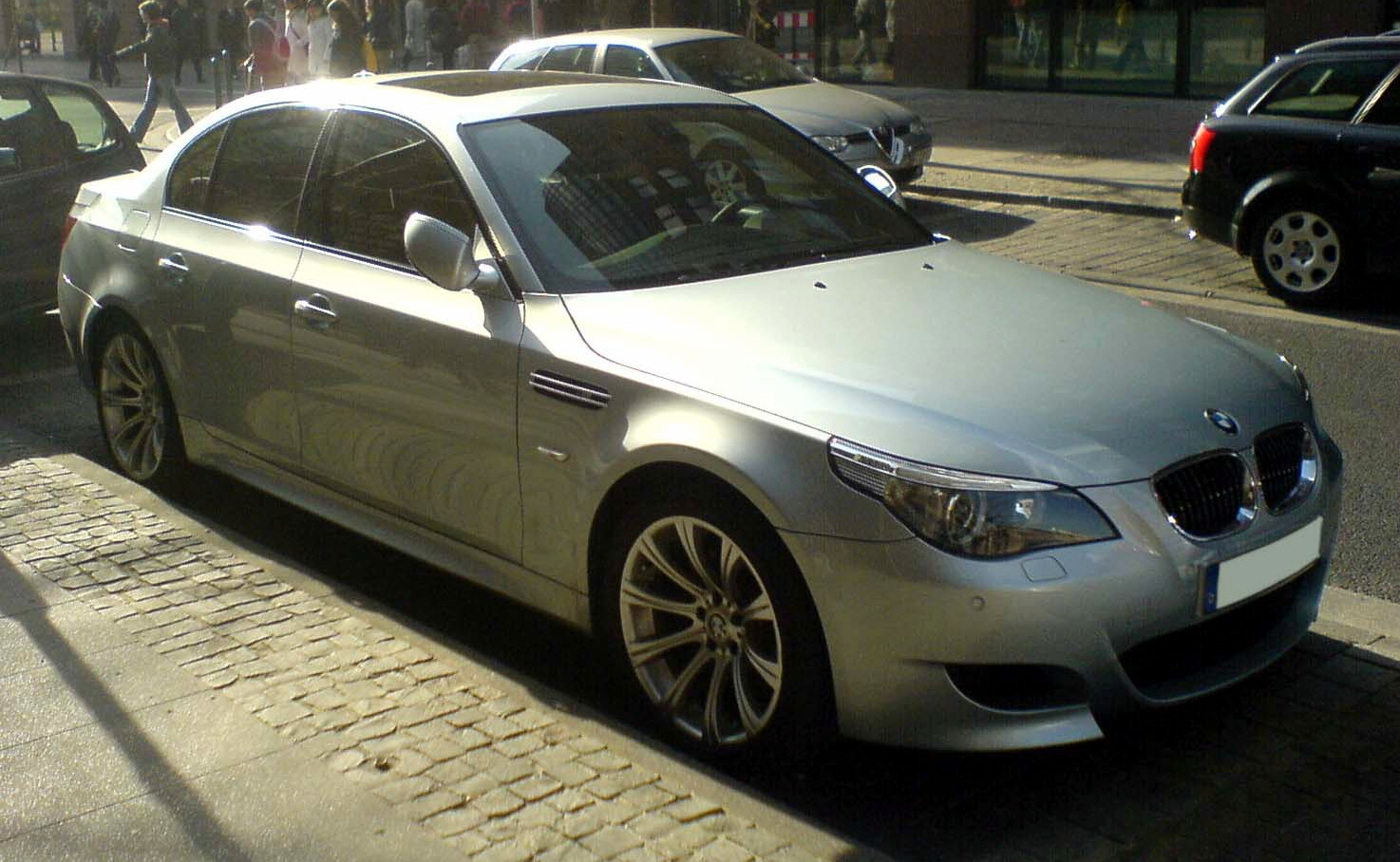 BMW M5 (E60)